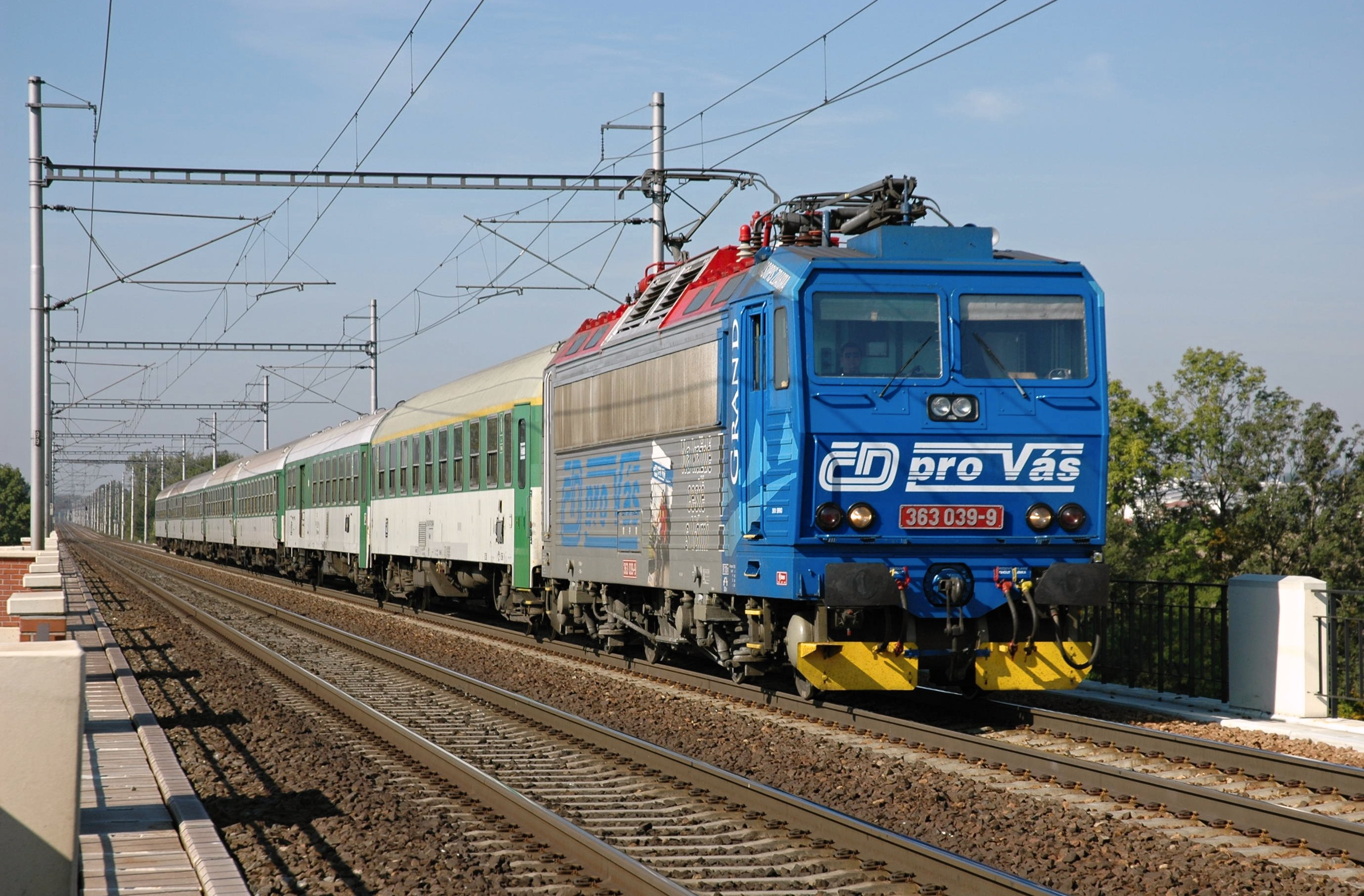 363.039 projíždí po Jezernickém viaduktu v úseku Lipník nad Bečvou - Drahotuše v čele rychlíku č. 735 Brno hl. n. - Bohumín